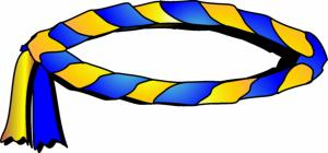 tortillon